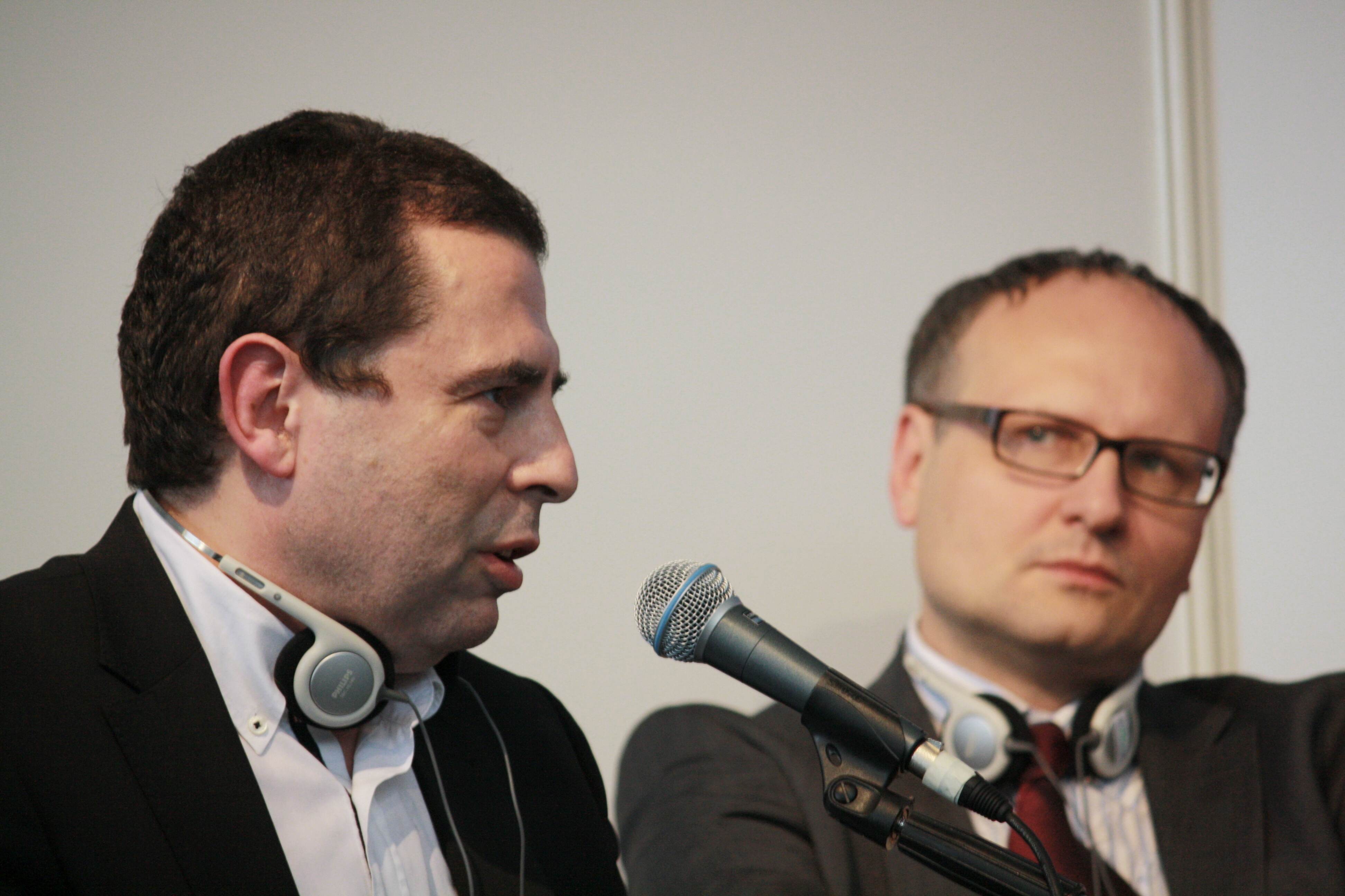 Svět knihy 2010 - Bronisław Wildstein a Paweł Lisicki This photograph was taken with a DSLR from WMCZ's Camera grant. Personality rights warning Although this work is freely licensed or in the public domain, the person(s) shown may have rights that legally restrict certain re-uses unless those depicted consent to such uses. In these cases, a model release or other evidence of consent could protect you from infringement claims.